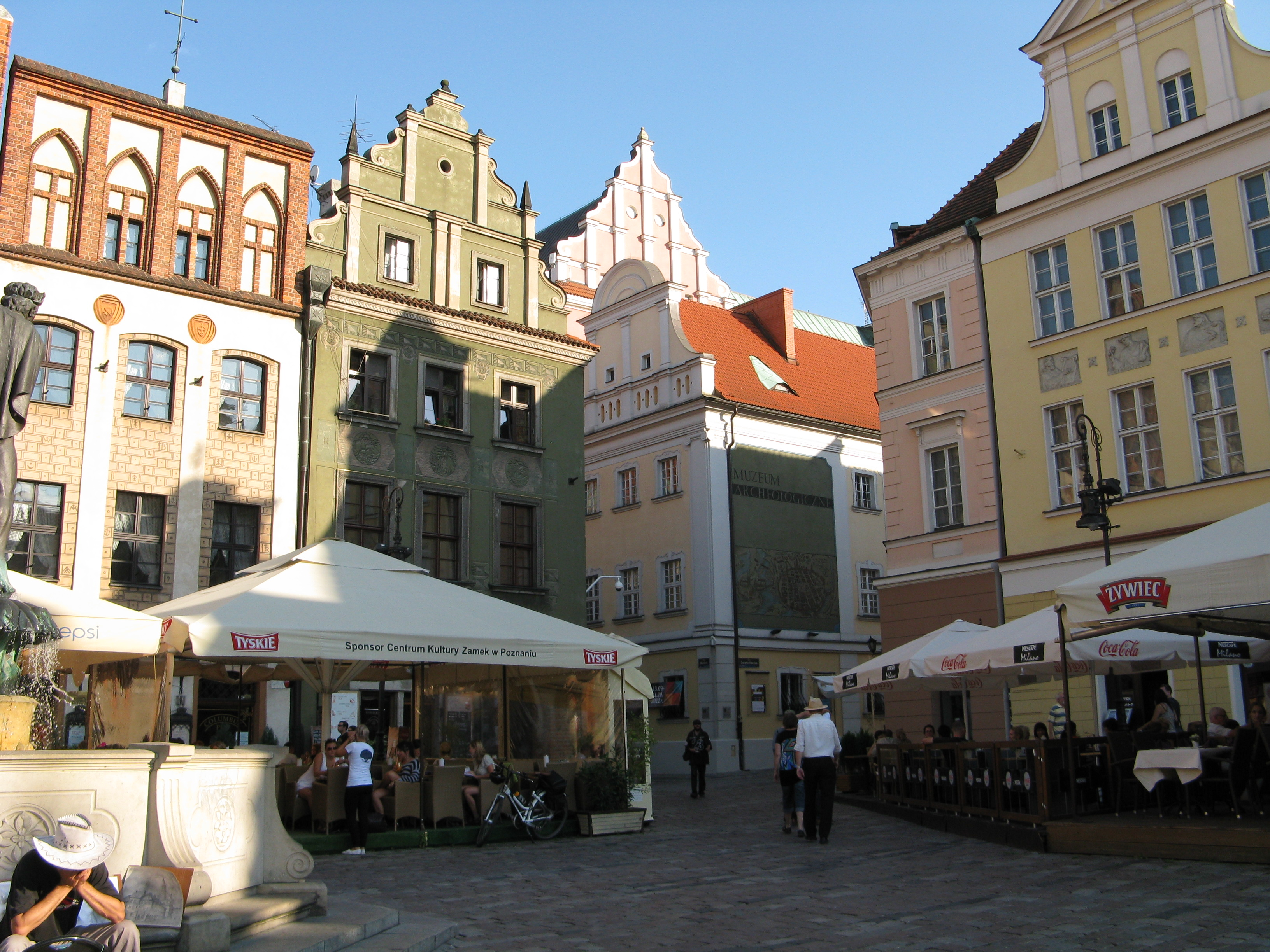 Pałac Górków, ob. muzeum Wodna ul. 27, Miasto Poznań